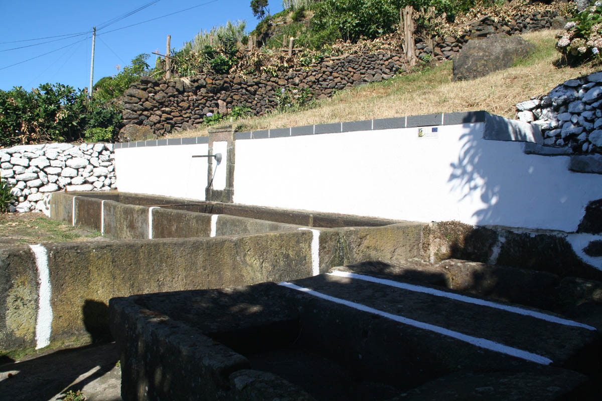 Chafariz da Carldeira, Lajes, Terceira, Açores, Portugal